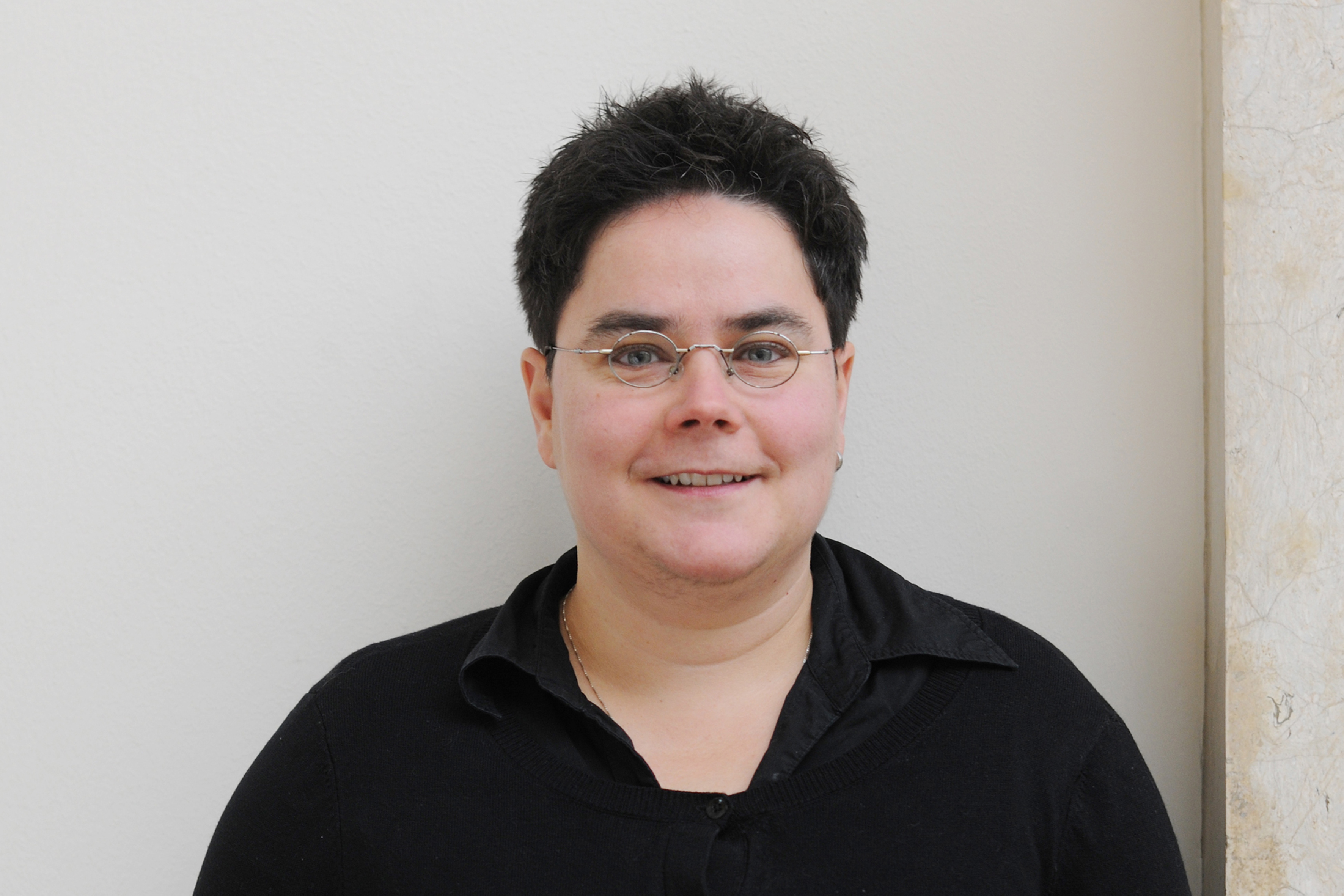 Marianne Burkert-Eulitz, MdA